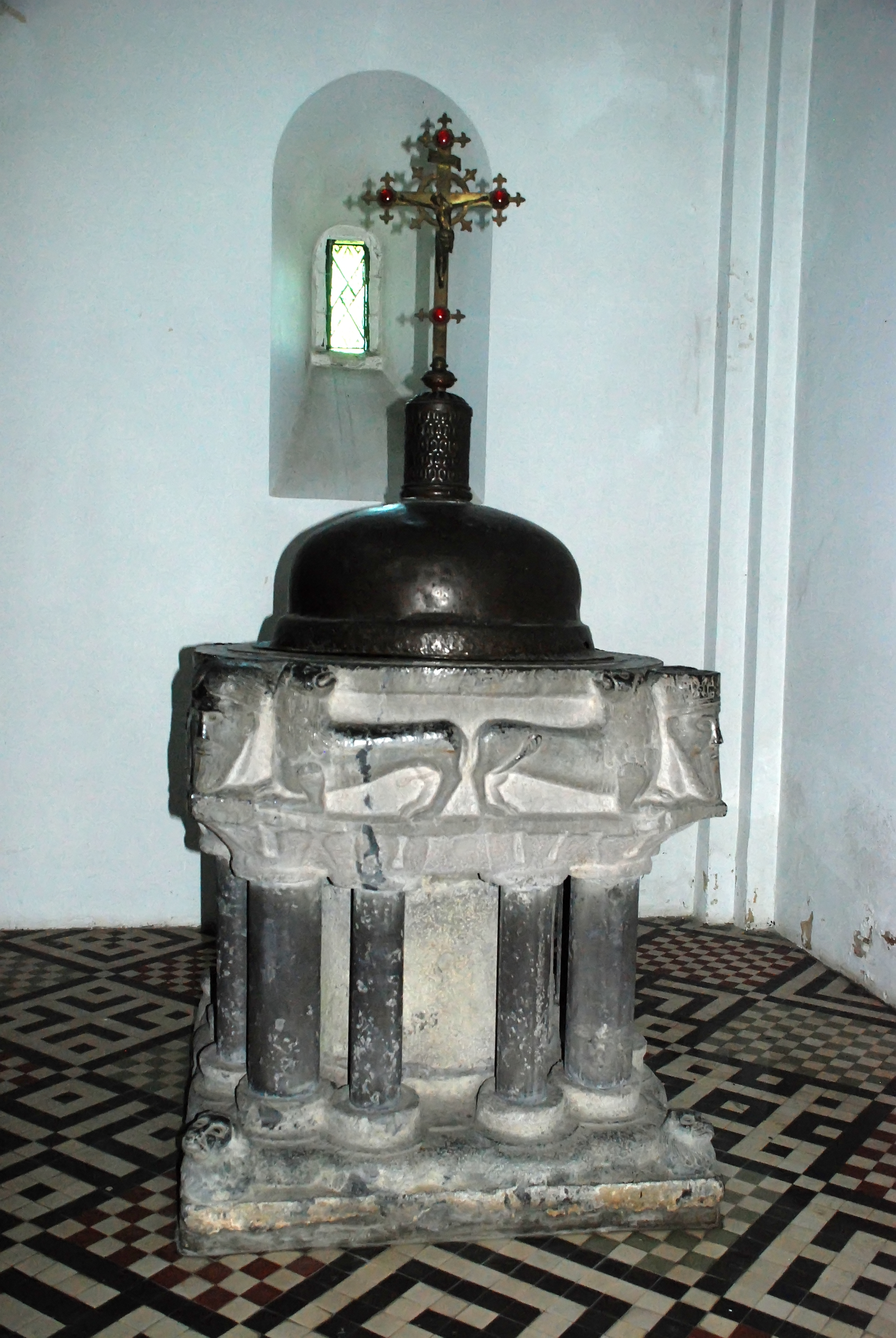 Belgique - Wallonie - Fonts baptismaux de Saint-Séverin-en-Condroz